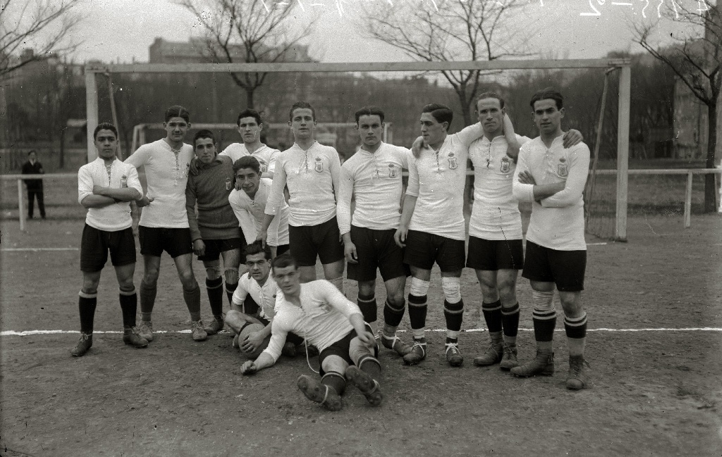 Título original: Partido de fútbol entre el Real Unión y Real Sociedad el campo de Atotxa (1/2) Localización: San Sebastián (Guipúzcoa)